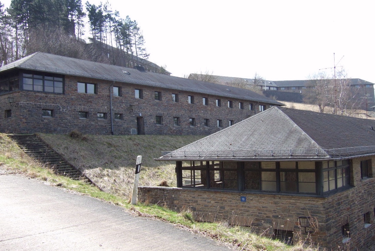 Ordensburg Vogelsang, Kameradschaftshäuser